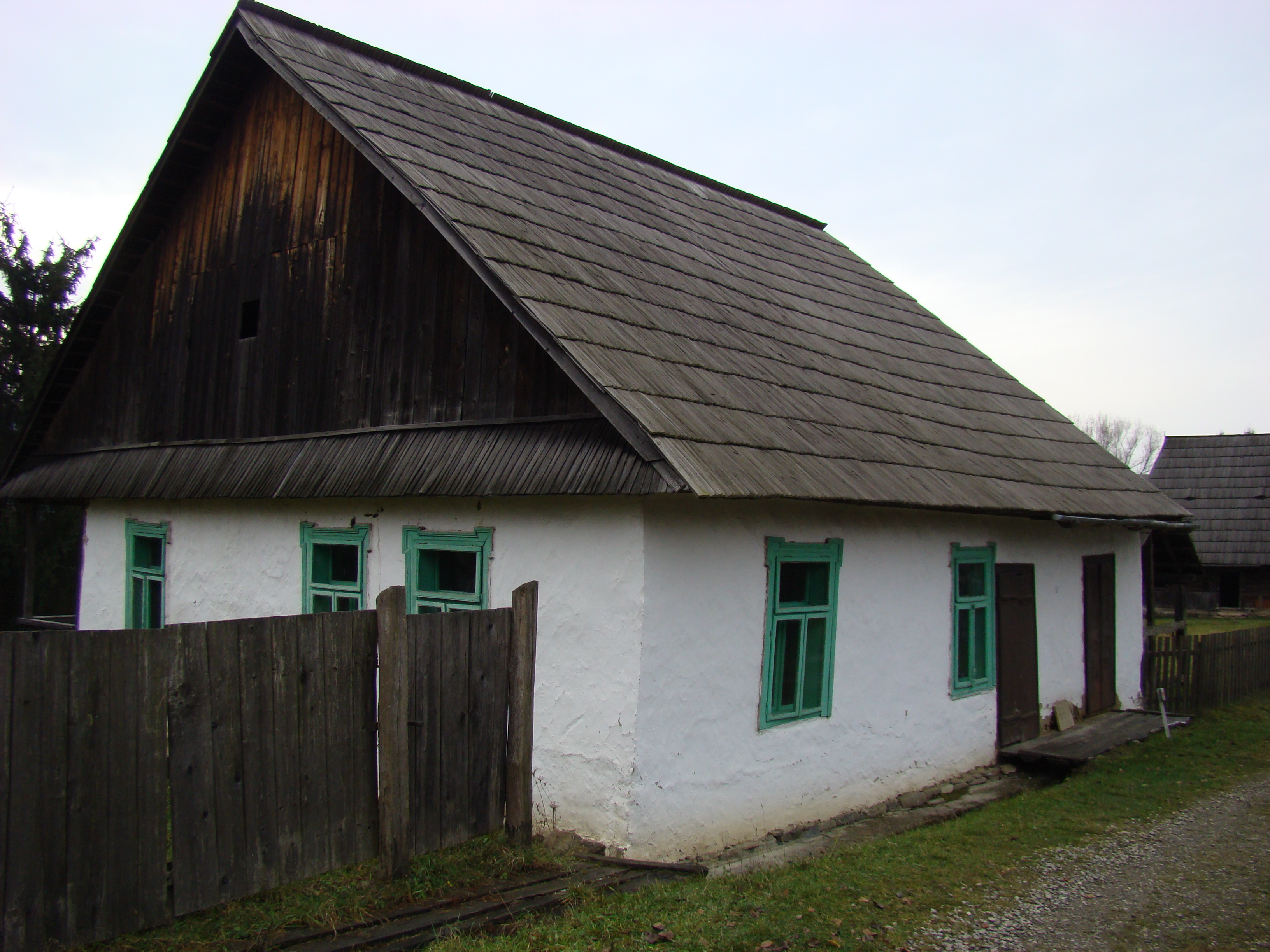 Muzeul satului maramureșean din Sighetu-Marmației